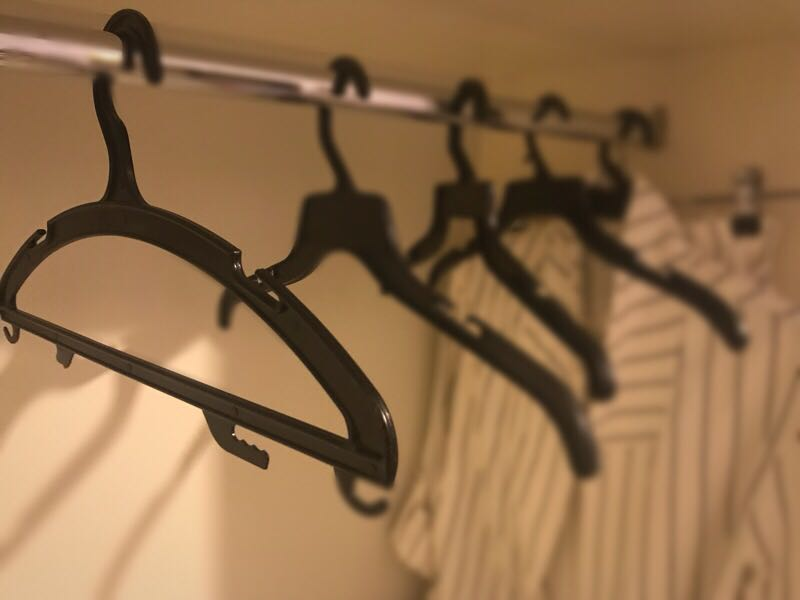 קולבים על מתלה שדרכם אפשר לתלות בגדים